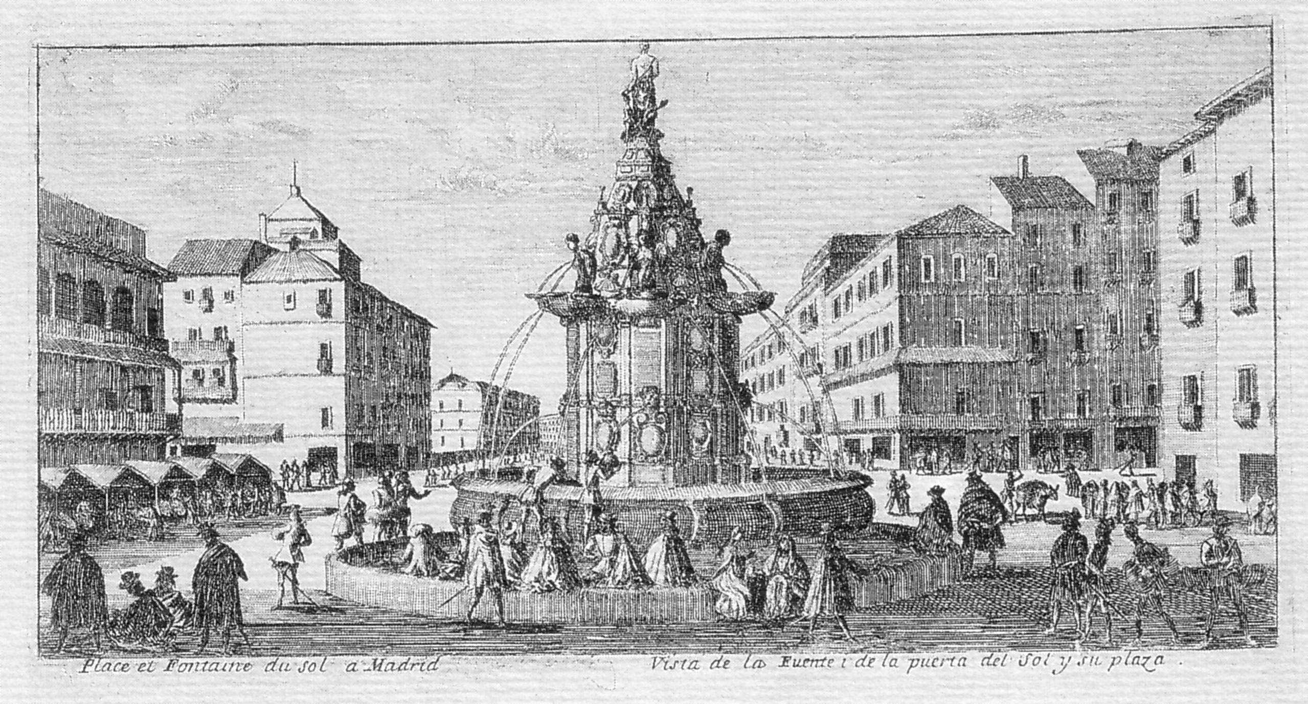 Vista de la Puerta del Sol hacia 1660, con la 'fuente del Buen Suceso', instalada allí en 1630 frente al Hospital del Buen Suceso, ya desaparecido; también llamada 'fuente de la Mariblanca, de Venus o de Diana' (según qué cronista), por la estatua que coronaba su estructura, y 'fuente de las Arpías', por las extrañas figuras que circundaban su pedestal. Cobre, talla dulce (134 x 246 cm.)